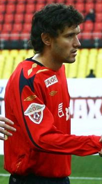 Yuri Zhirkov, Russian footballer.